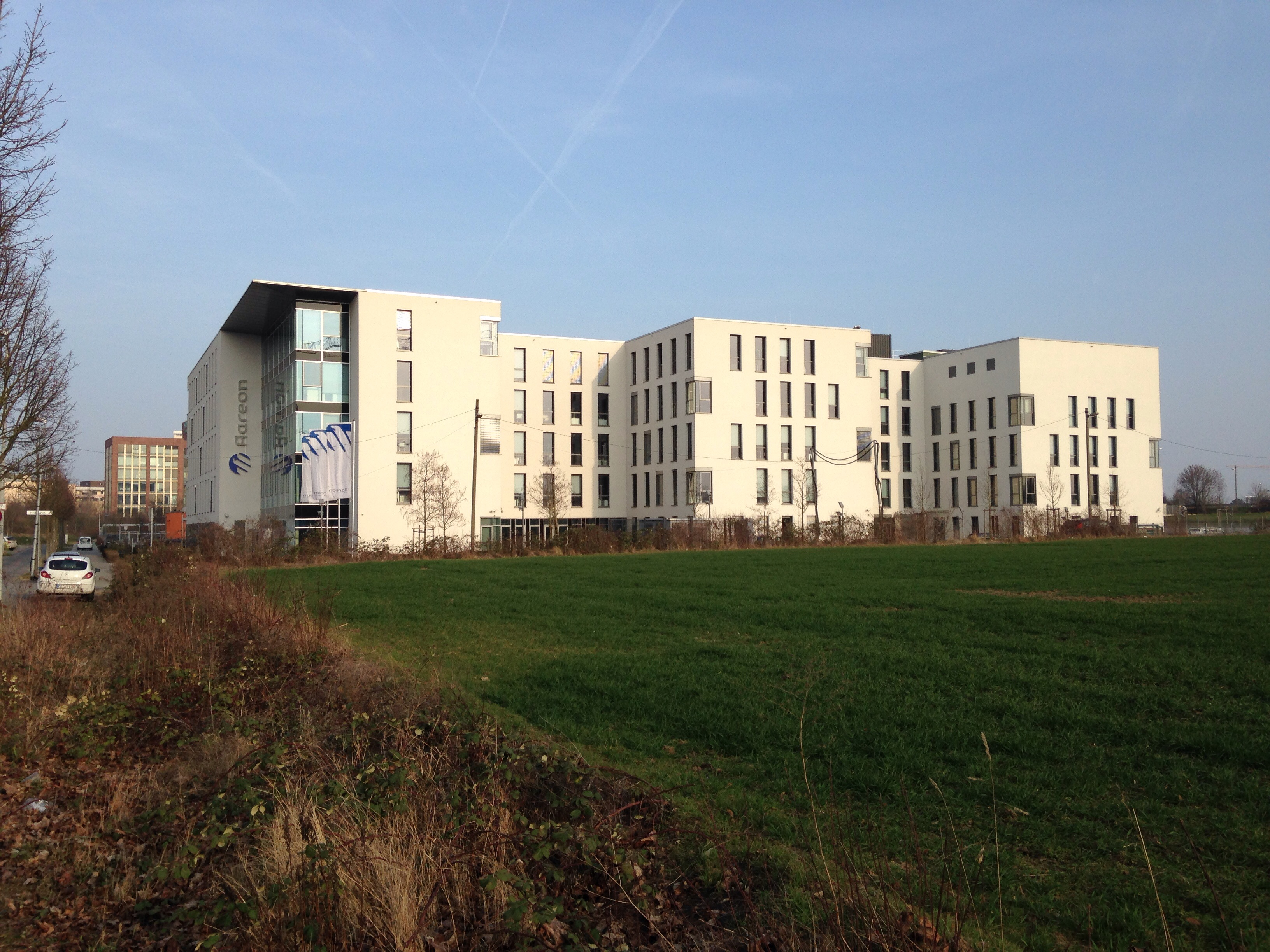 Aareon